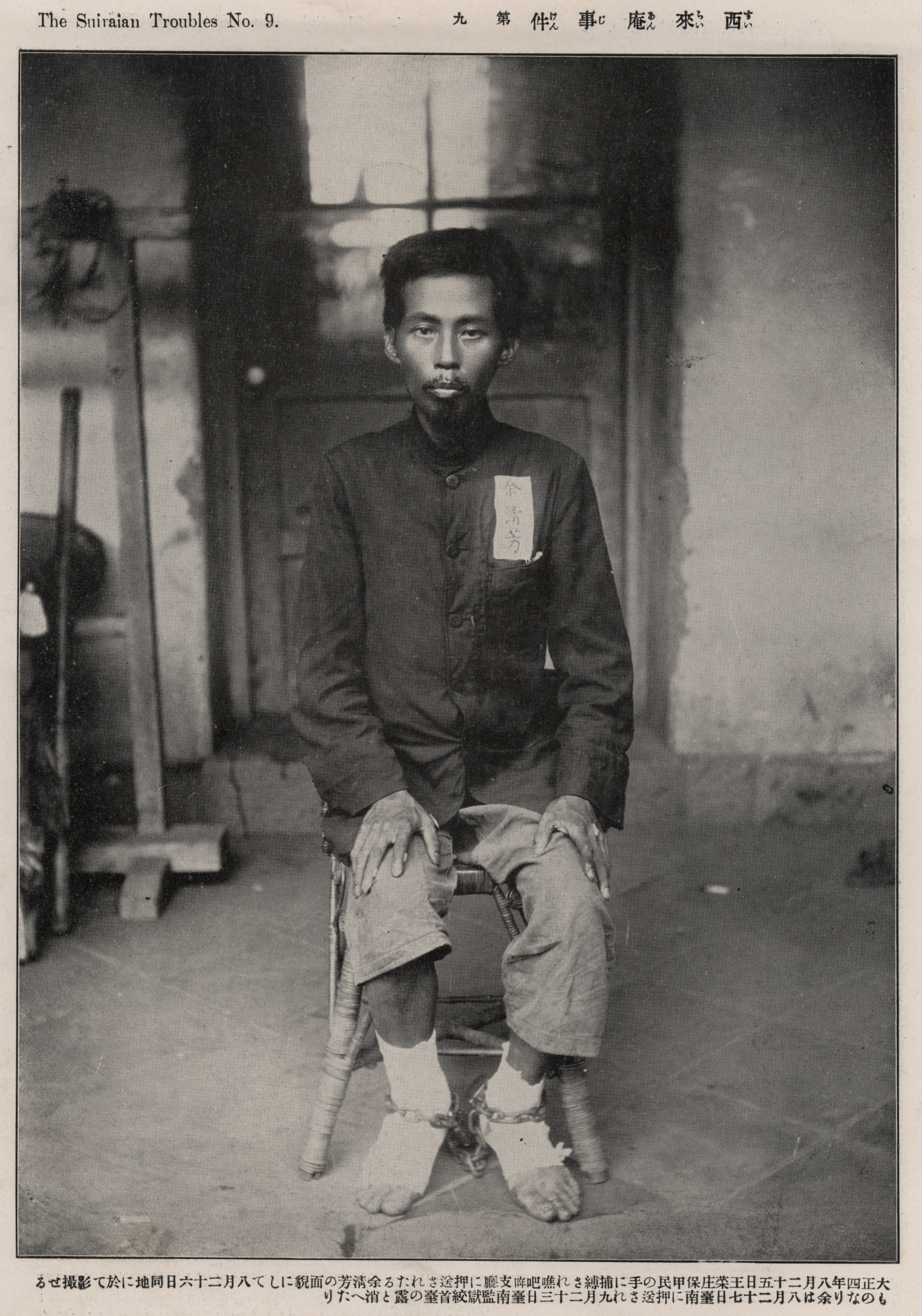 余清芳照片